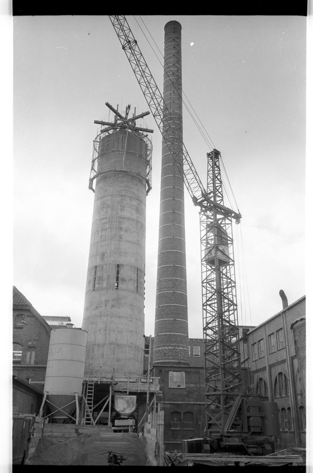 Neuer Schornstein im Fernheizkraftswerk der Stadtwerke Kiel im Knooper Weg, Ecke Humboldtstraße im Bau